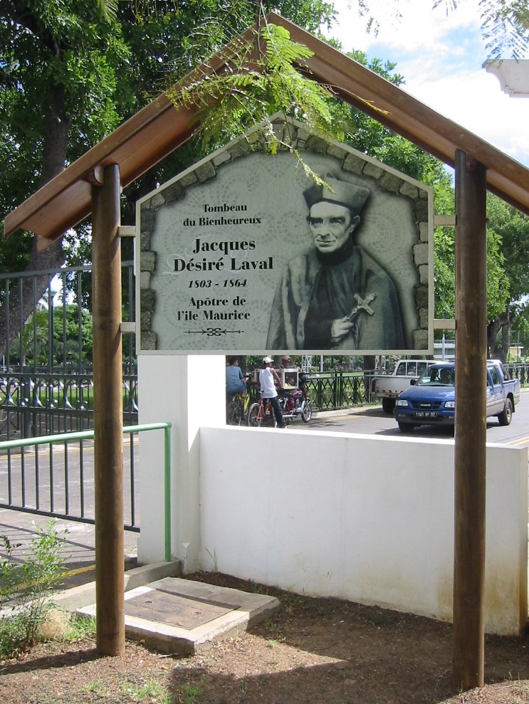 Photographie personnelle de Benoît Smerecki (sblaval). Elle peut être utilisée librement.